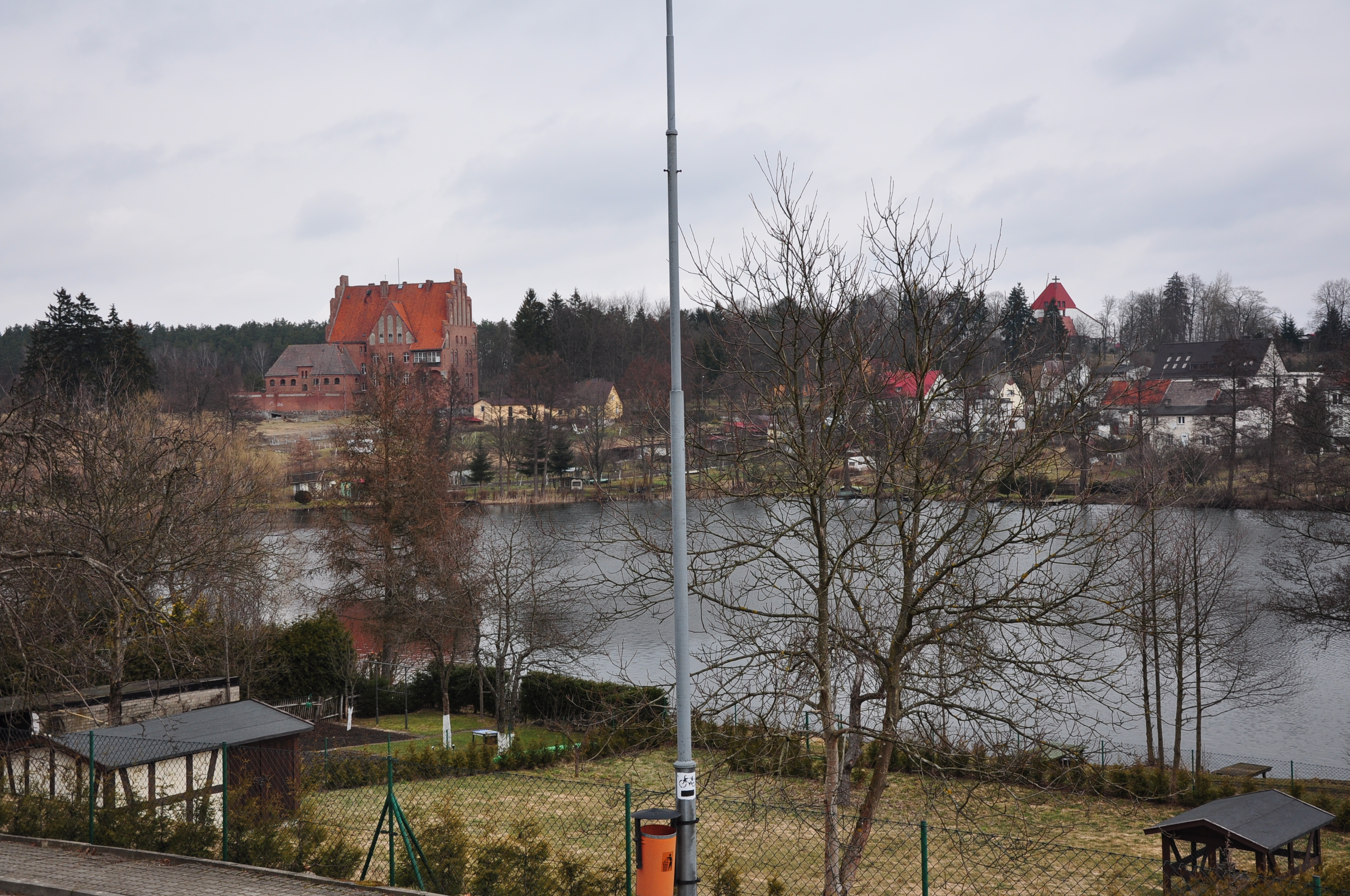 Biały Bór.